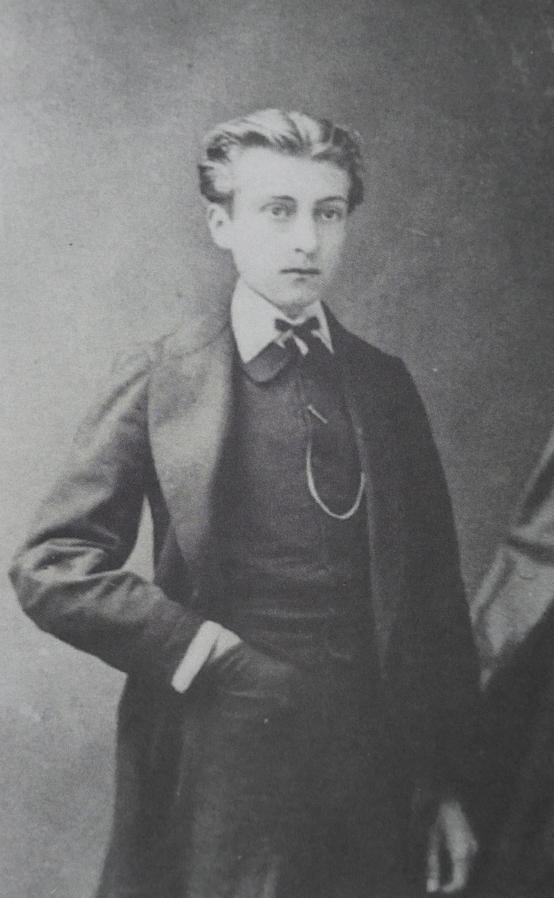 Julien Viaud (Pierre Loti) en 1867, pensionnaire à l'Institution Bon-Jubé à Paris. Photographe anonyme, collection privée.